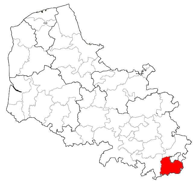 Localisation de la CCCB dans le Pas-de-Calais.